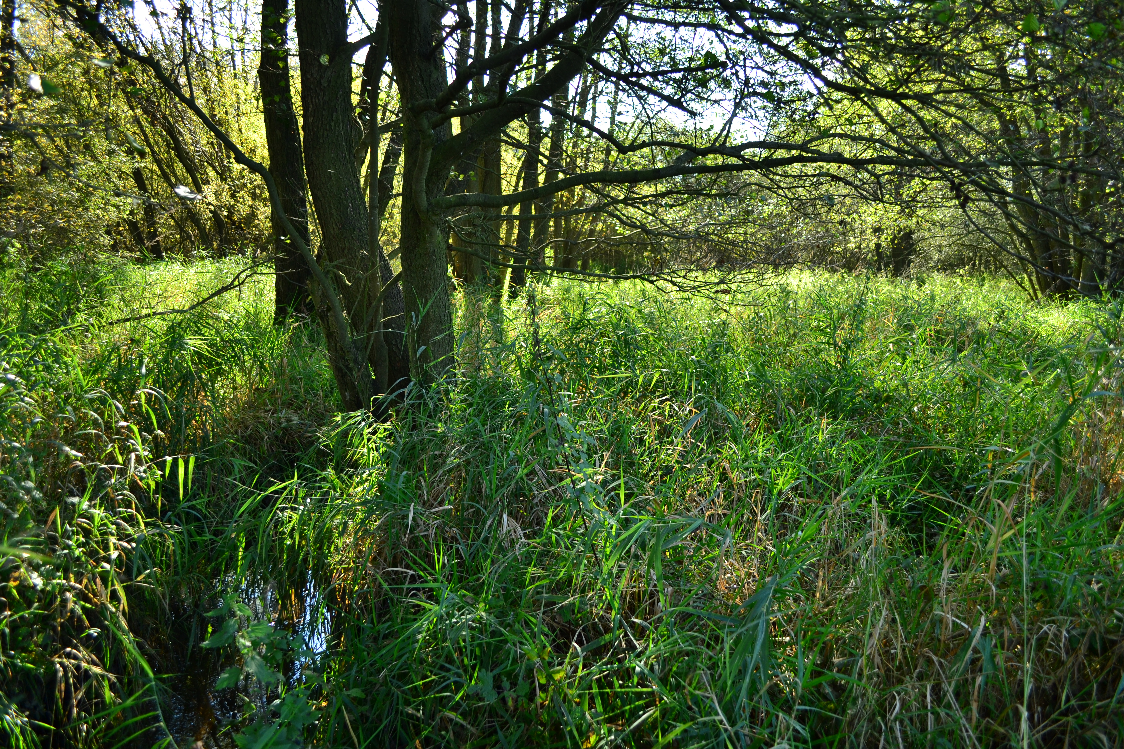 Bezprostřední okolí potoka